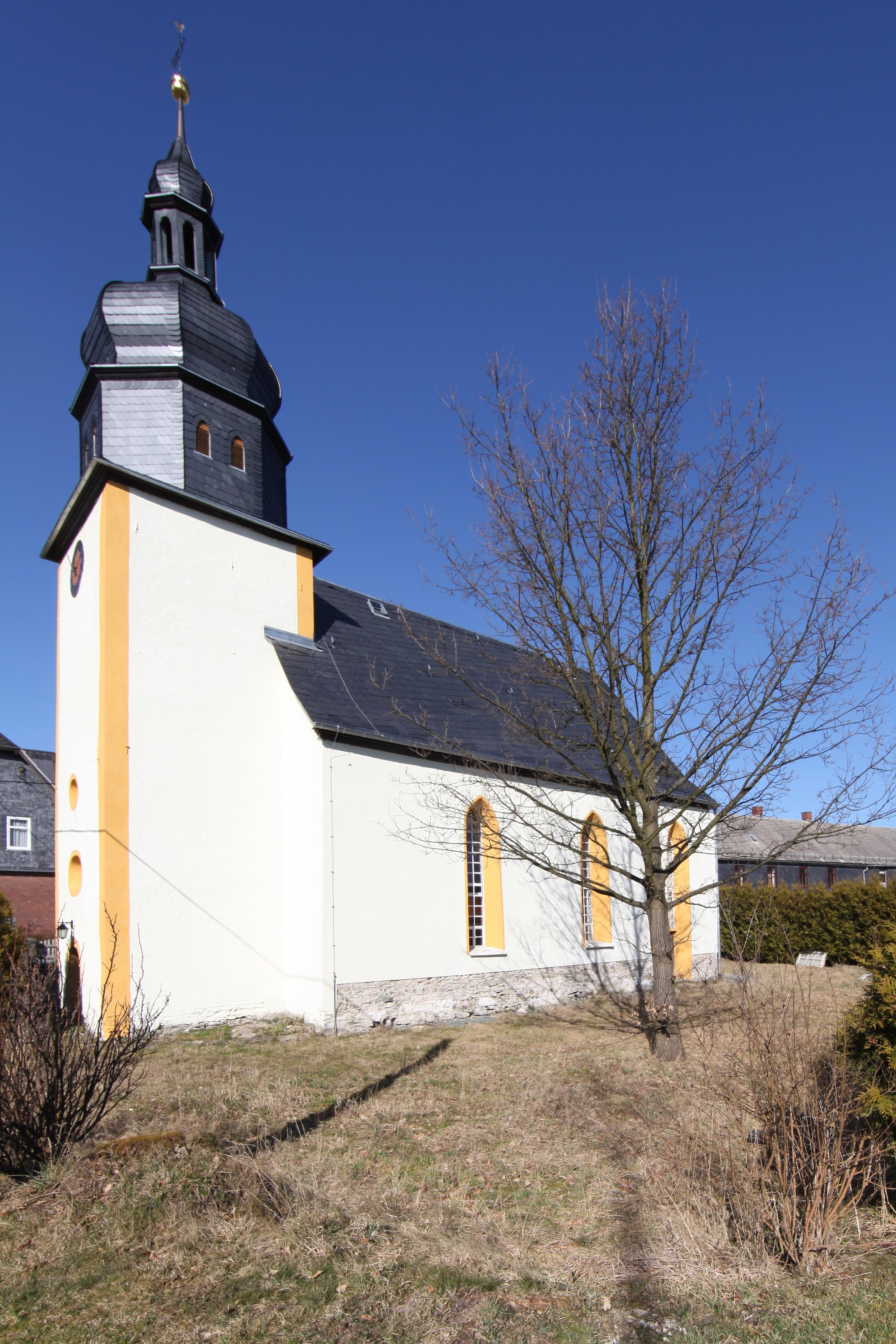 Blintendorf-Ev-Kirche